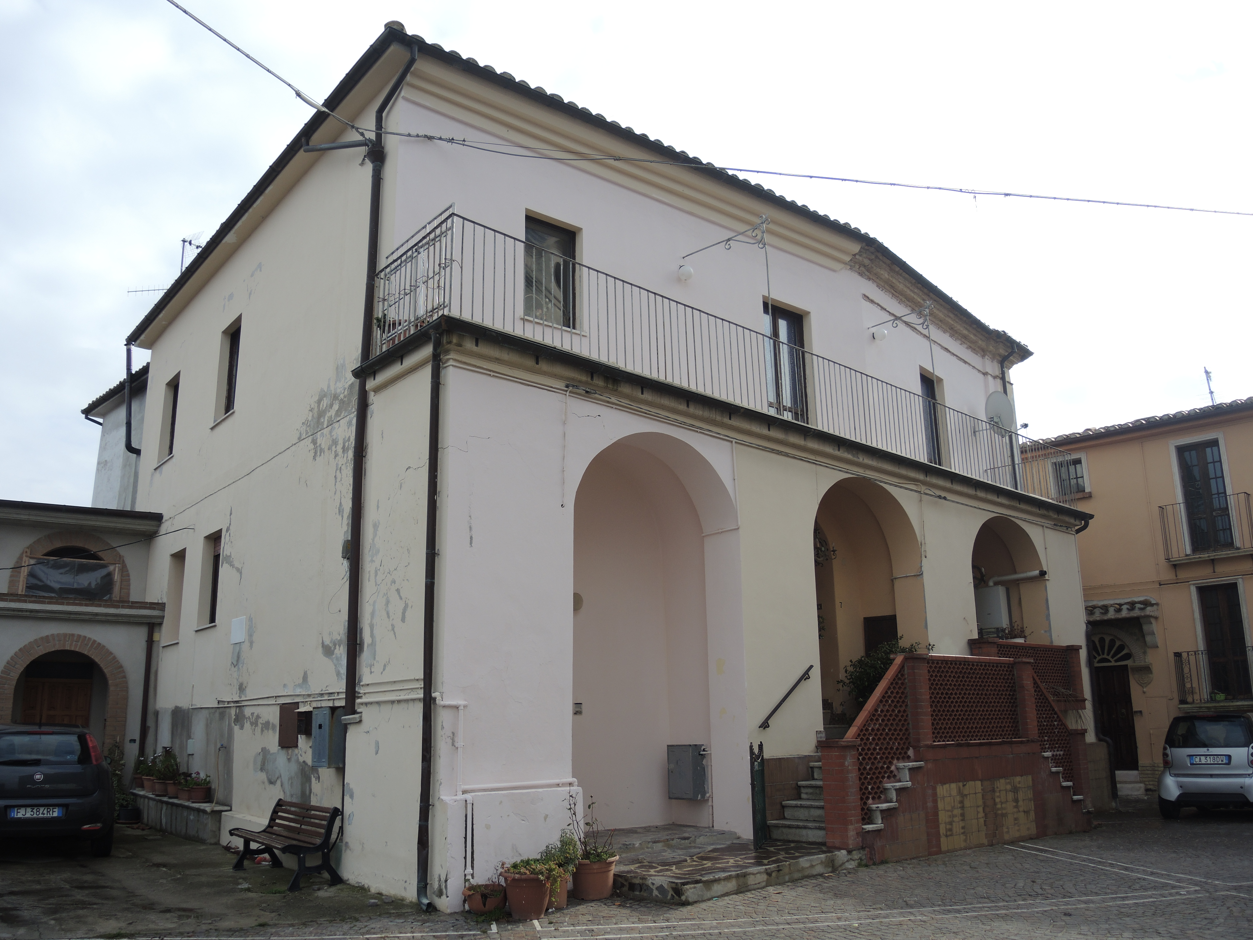 Cermignano - Chiesa di San Rocco